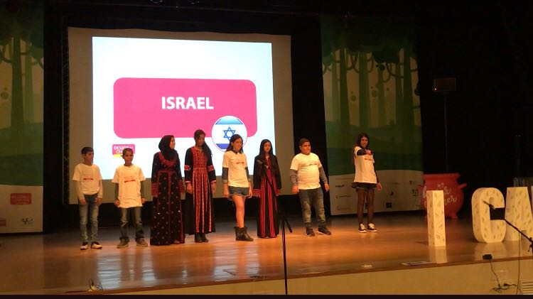 הנבחרת הישראלית בכנס הבינלאומי במדריד